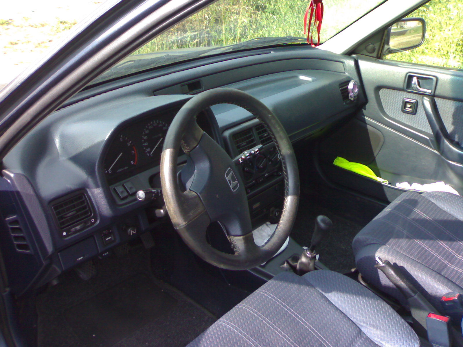 Interior del Honda Concerto.